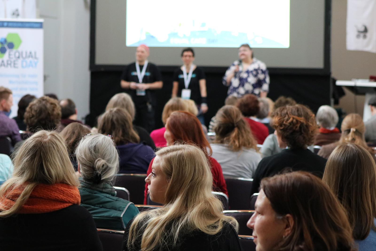 v.l.n.r Sascha Verlan und Almut Schnerring (Initiator*innen) und Karin Krubeck (Moderatorin) auf dem CareCamp am 1. Tag der Equal Care Day Konferenz in Bonn 2020